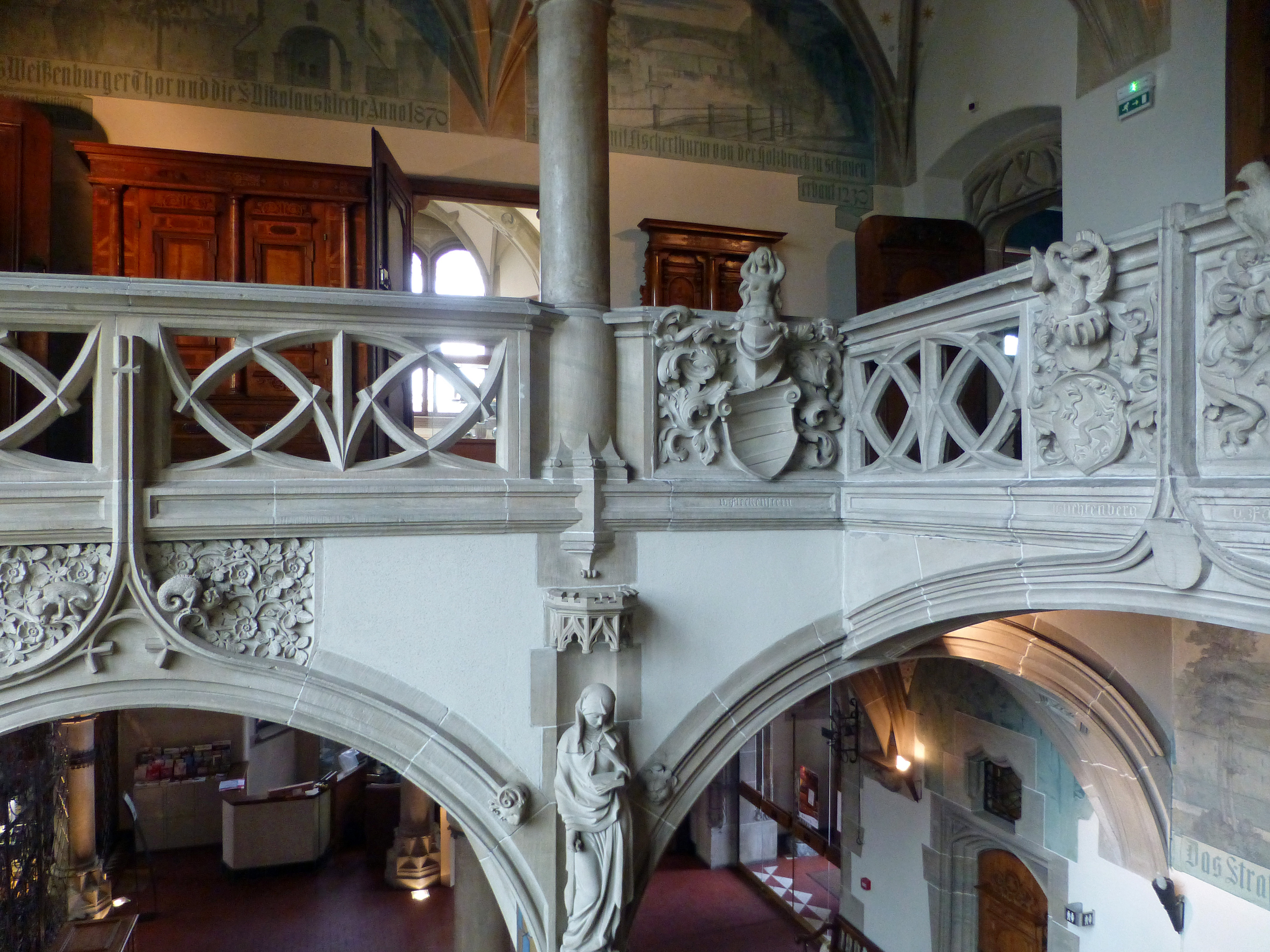 Musée historique de Haguenau (Bas-Rhin, France)